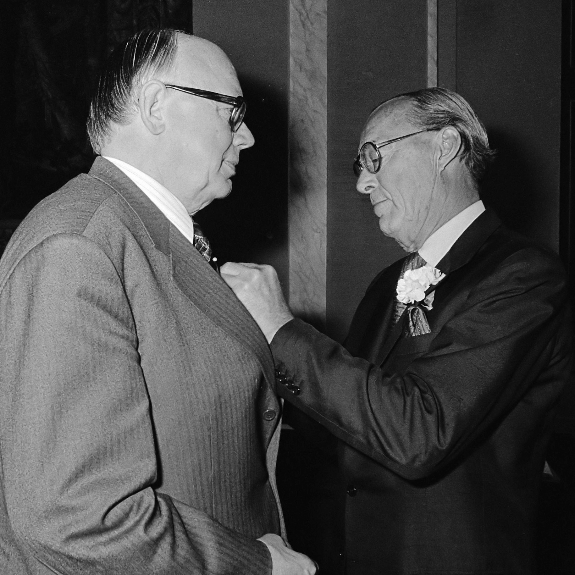 Uitreiking Zilveren Anjers door Prins Bernhard in Paleis op de Dam ; C.C. van Valkenburg 27 juni 1980